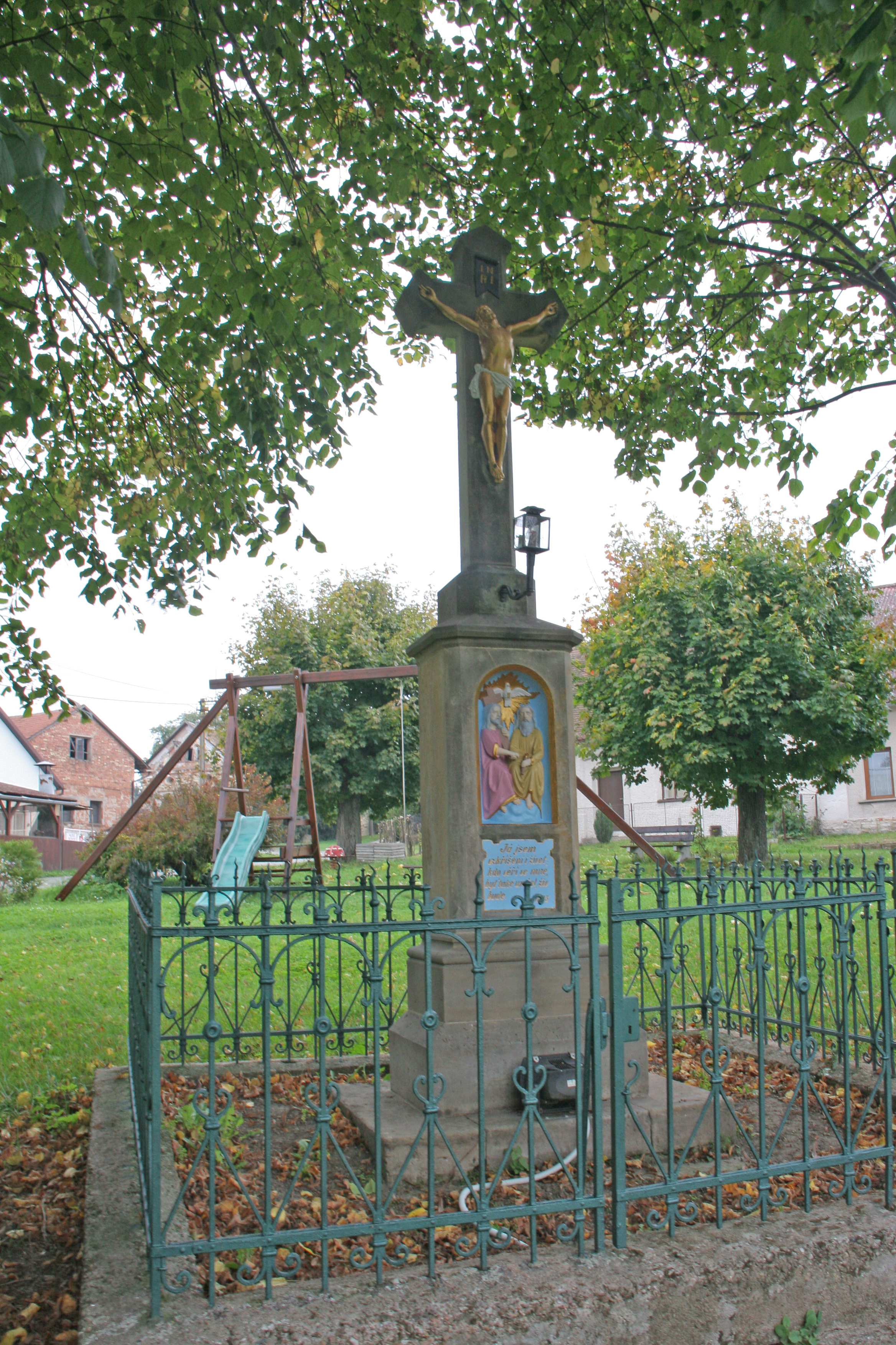 Městec kříž